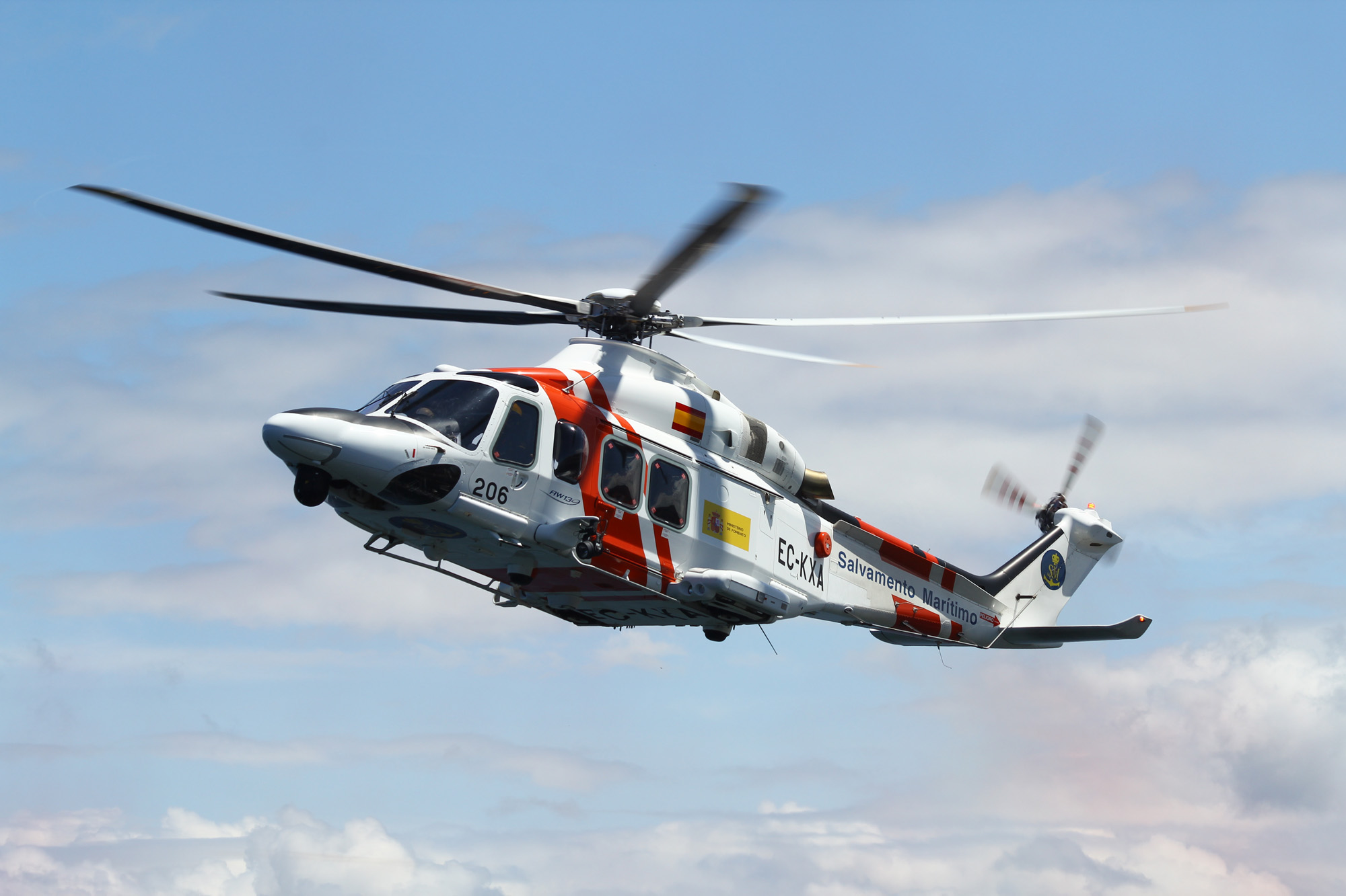 Festival Aéreo de La Coruña, España. 20 de julio de 2014. Augusta Westland AW-139 EC-KXA of Helimer, Maritime Rescue Corunna AirShow, Spain. July 20, 2014.